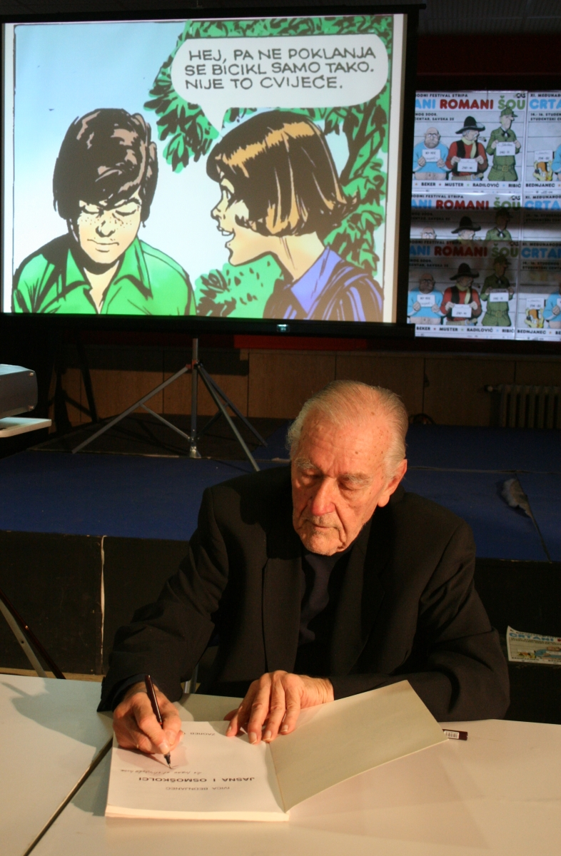 Ivica Bednjanec potpisuje svoj strip na CRŠ-u 2008. u Zagrebu